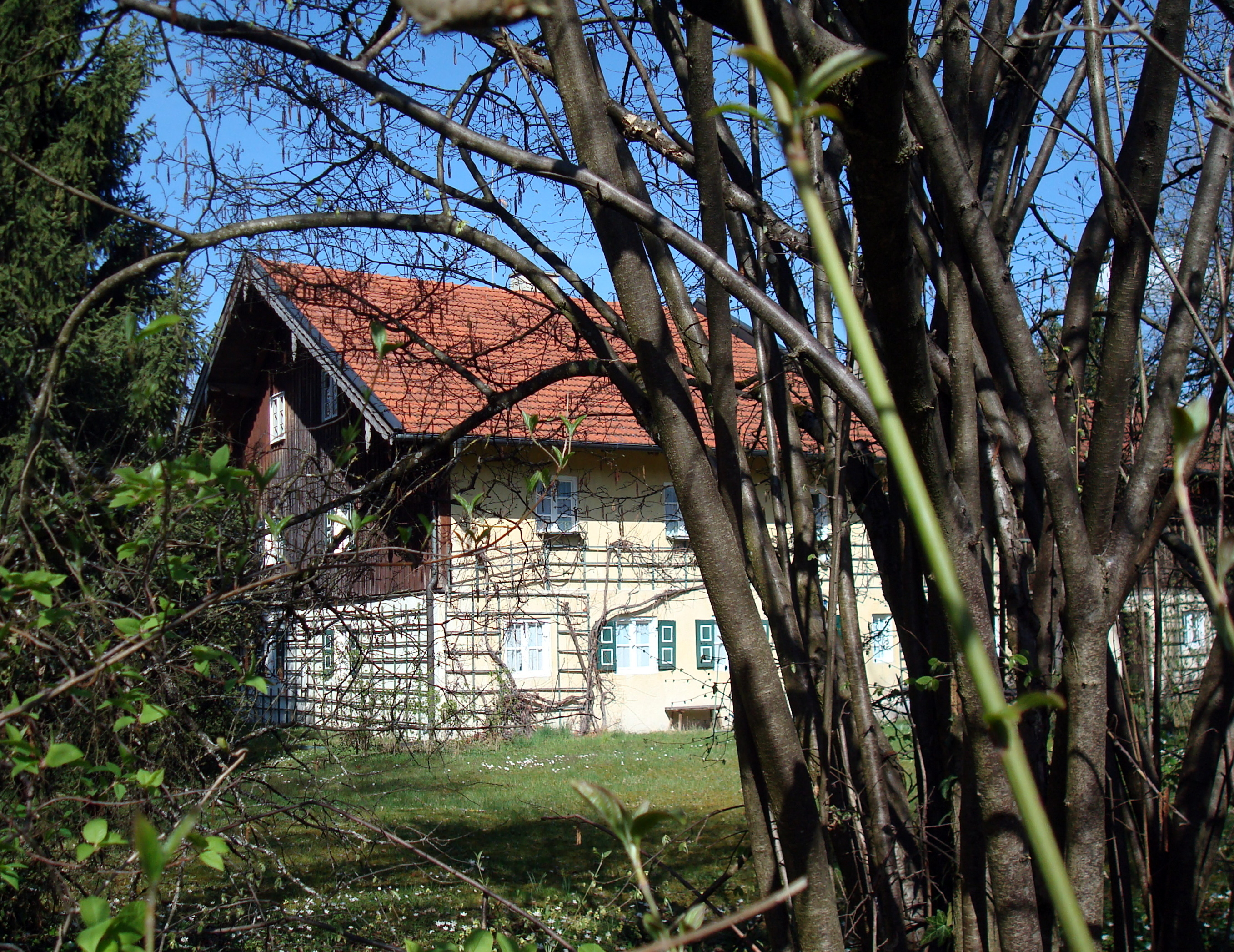 Berg am Starnberger See, Grafstraße 5. Das ehemalige Bauernhaus, eine Einfirstanlage mit Satteldach, stammt aus der 1. Hälfte des 19. Jahrhunderts, ist aber im Kern älter.